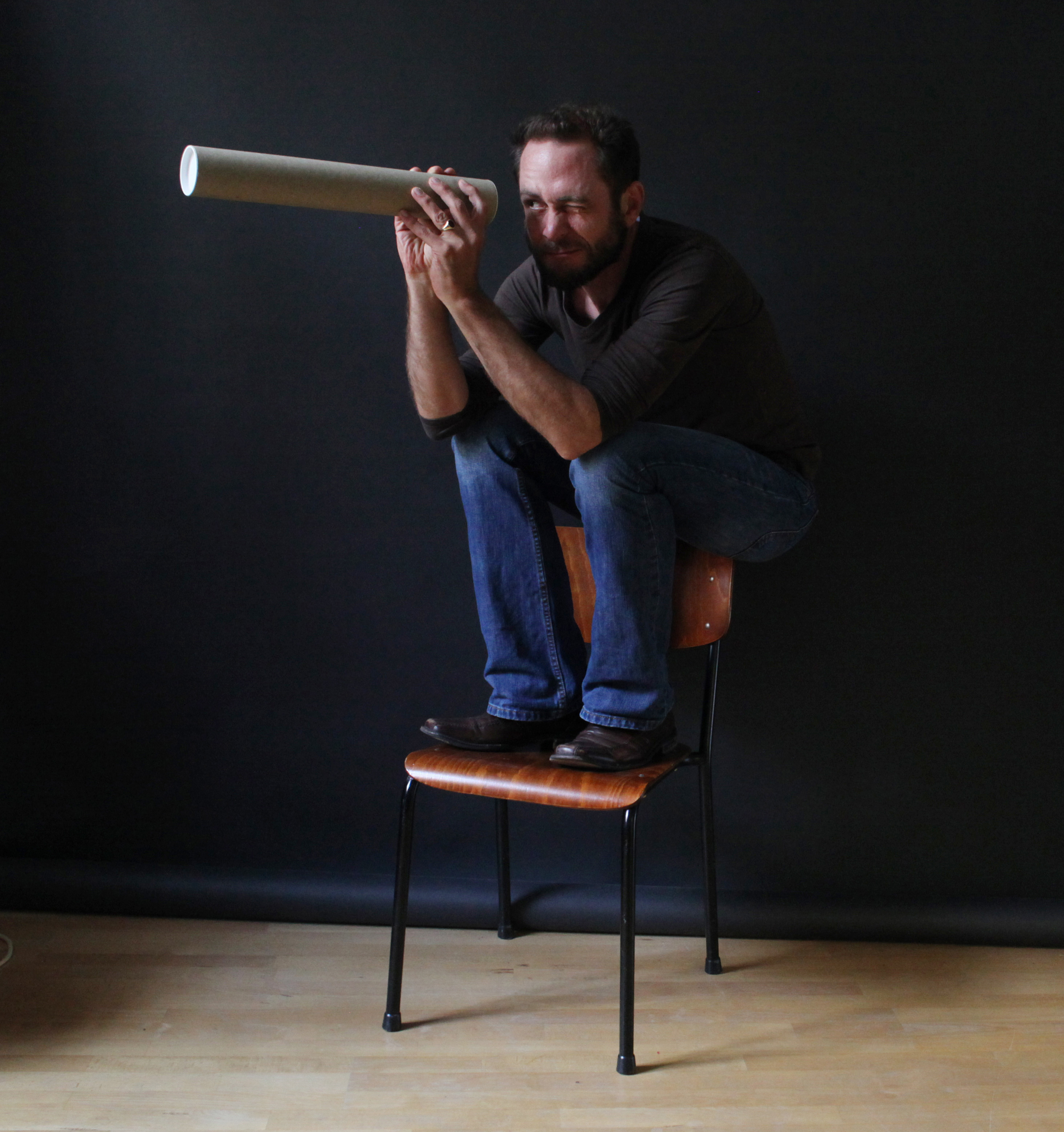 Andreas Bohnenstengel in seinem Studio